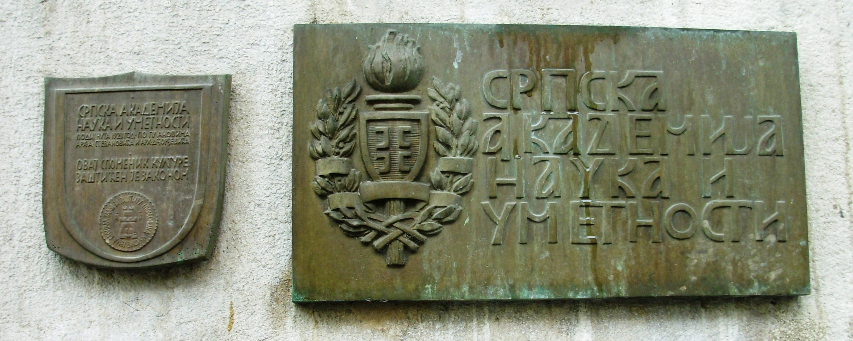 Tabla na SANU, Beograd. Slikao Goldfinger